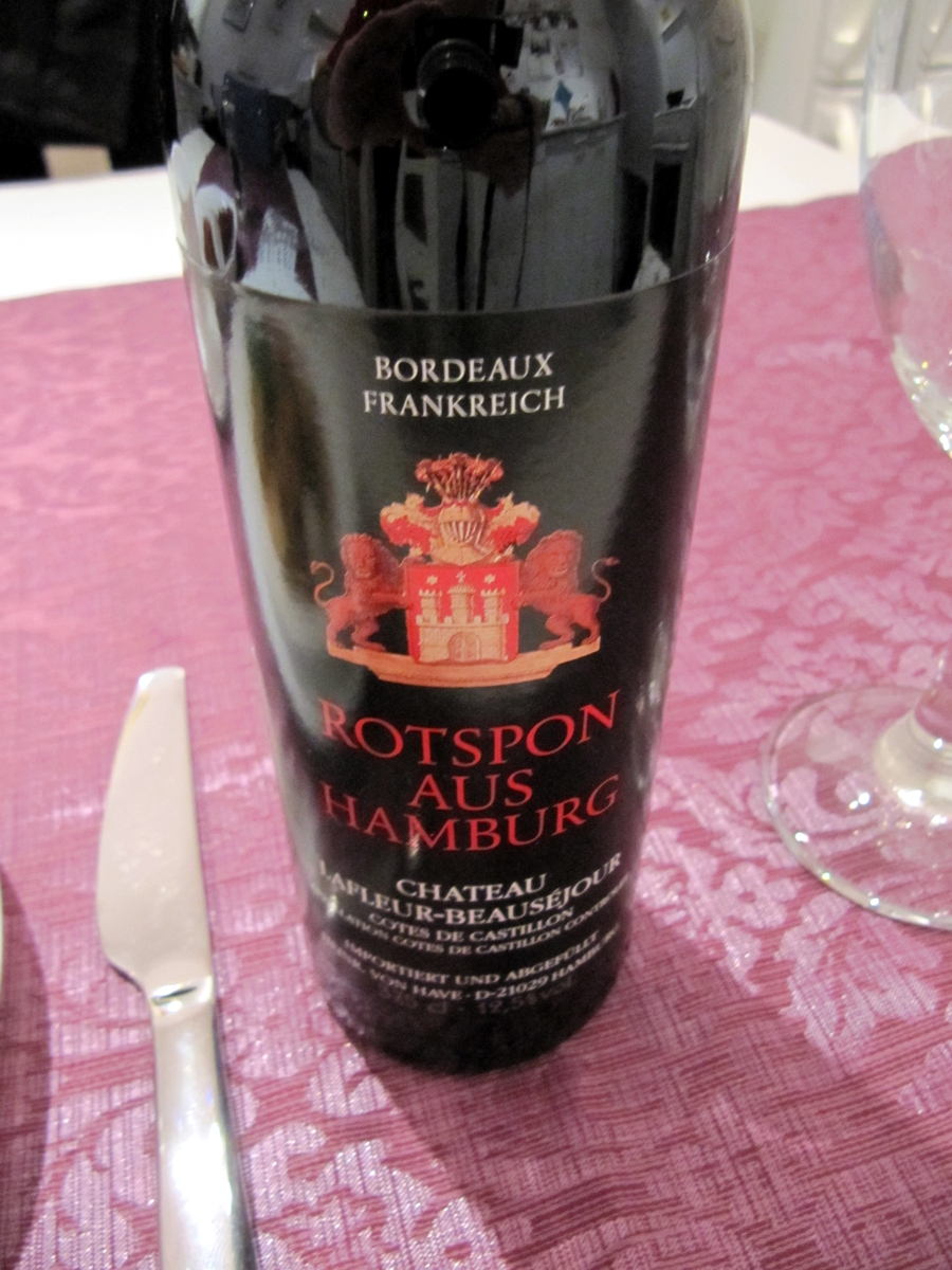 Eine Flasche Rotspon aus Hamburg